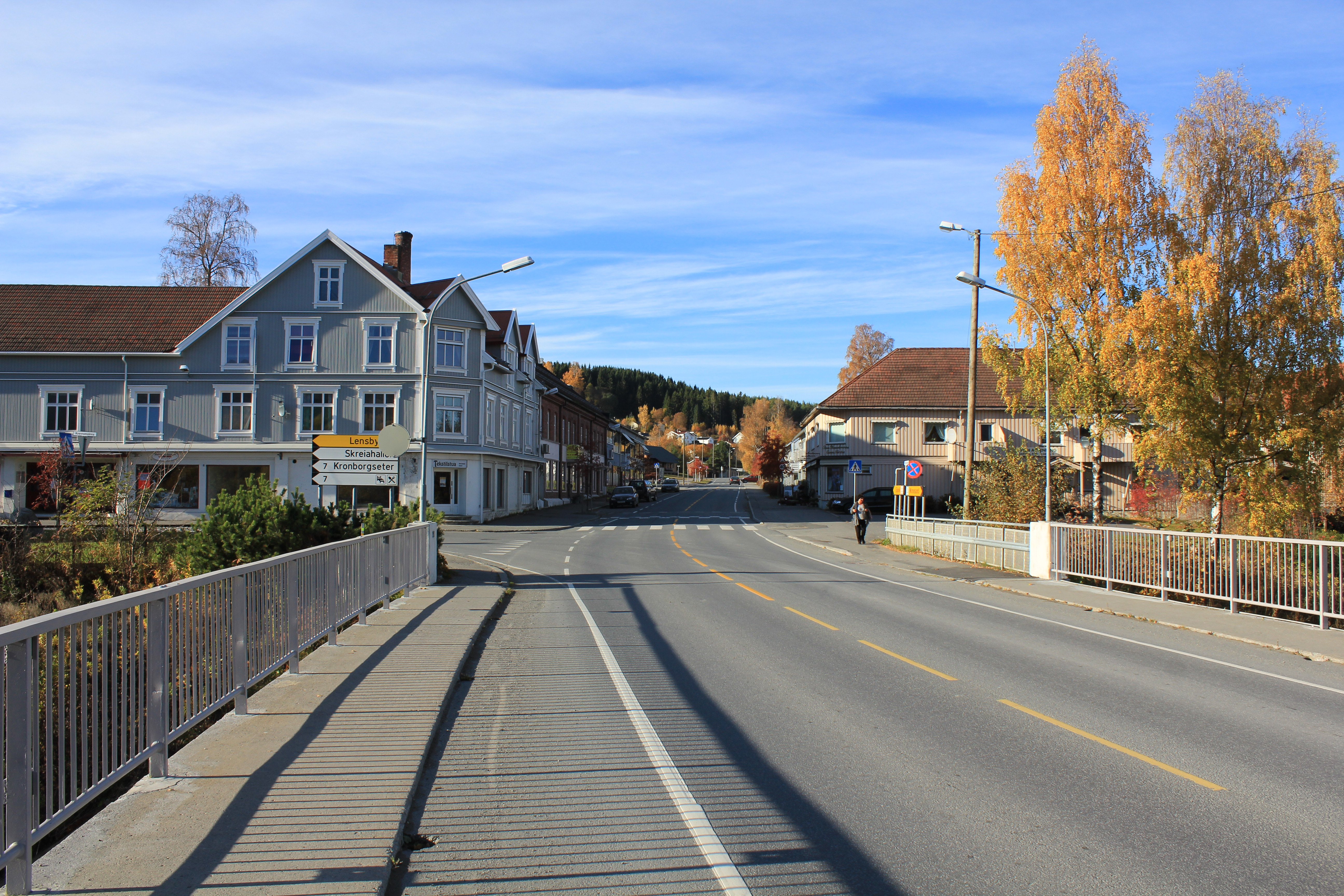 Skreia sentrum.